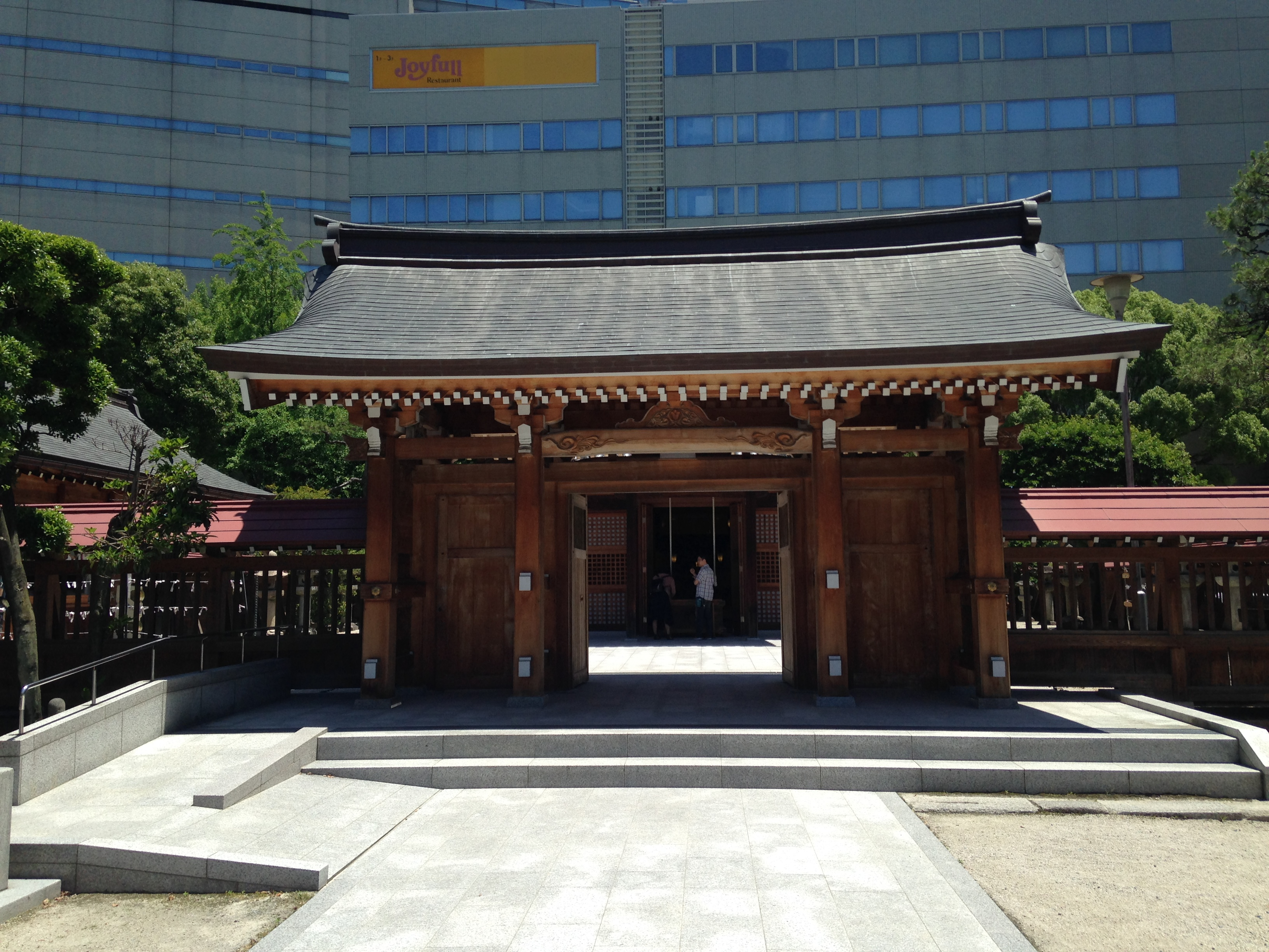 警固神社の神門